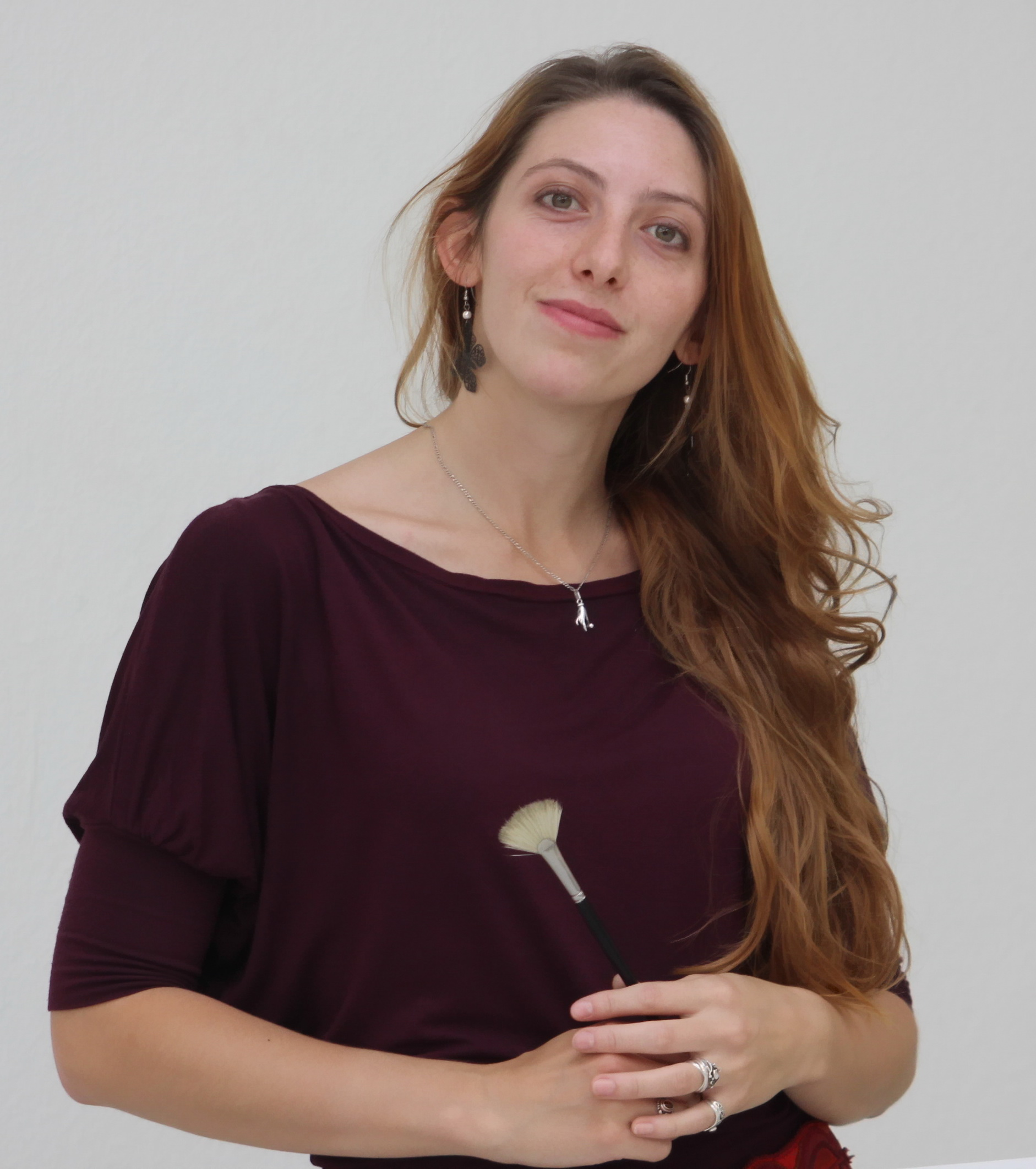 Lucia Jantso - Kunstmalerin und Synchronsprecherin